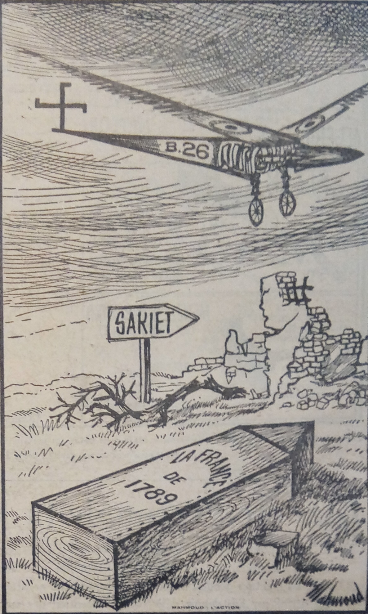 Sakiet sidi youssef laction 17 fev 1958